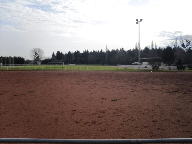 Le stade Jean Miaud de Grigny (91)